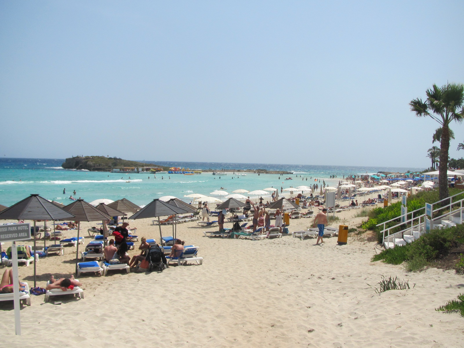 Ayia Napa Monastery